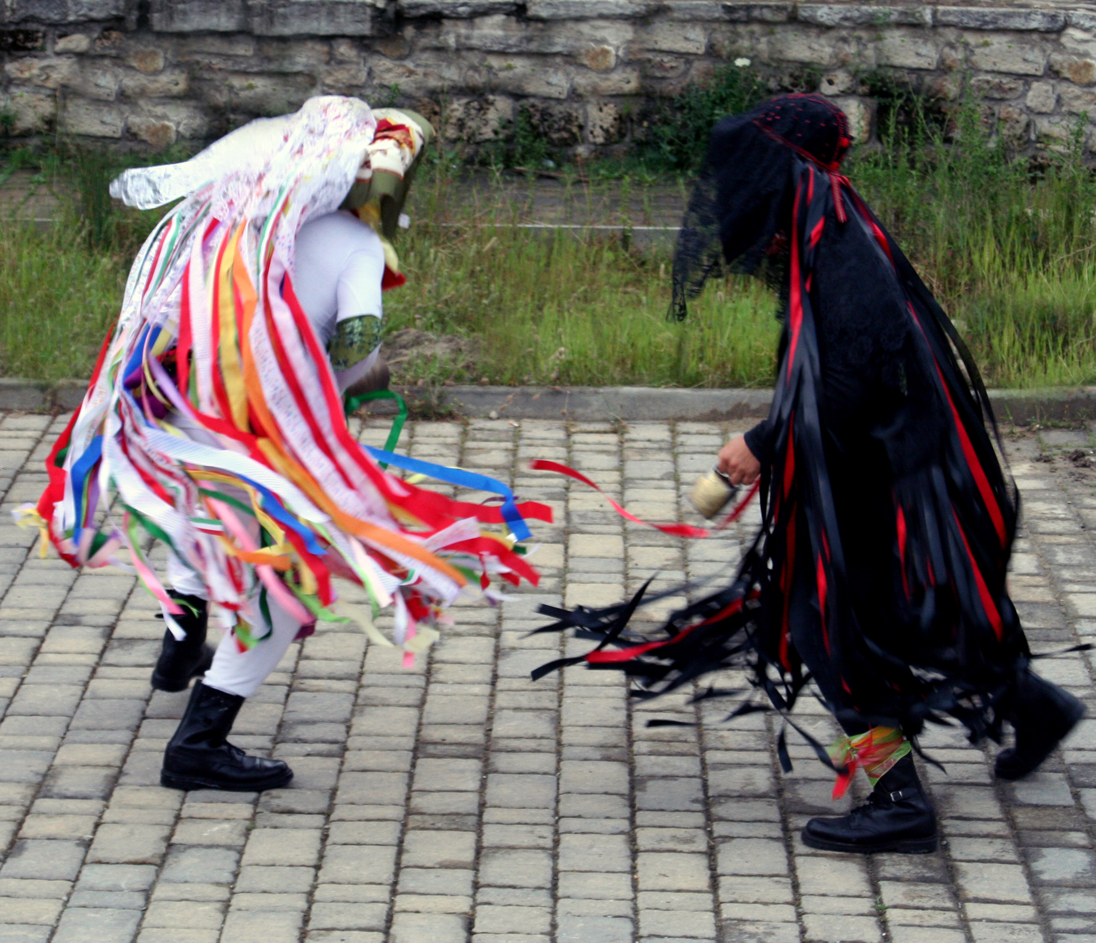 "Scaramucce" tra mucca e toro. Rocco Stasi, fatta da me, sono l'autore. Come in natura, il "maschio" e la "femmina" si attraggono e si respingono. GFDL, sono l'autore